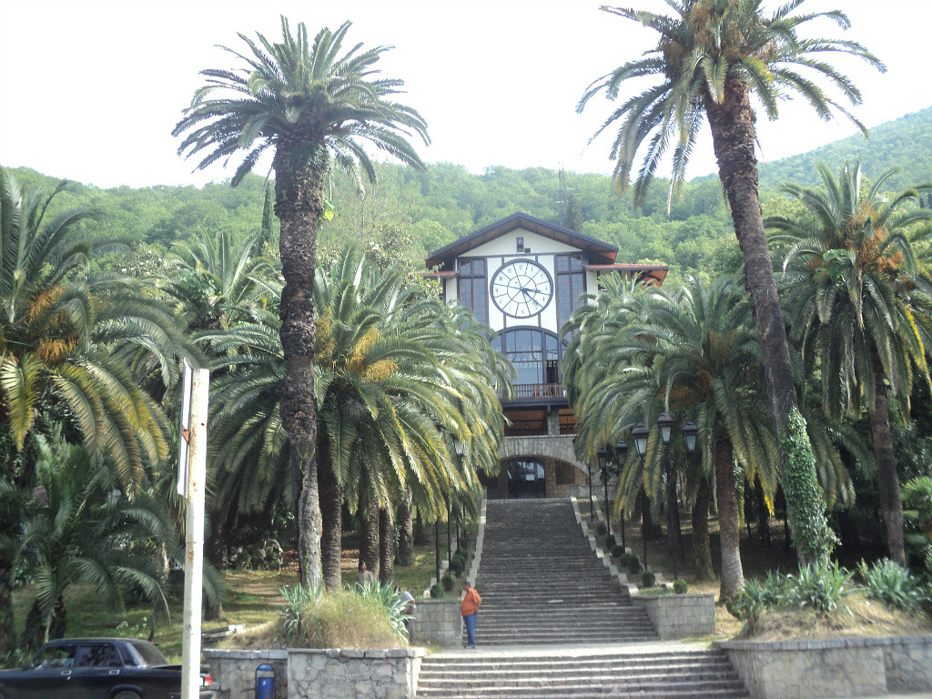 Ресторан "Гагрипш" в 2013 году